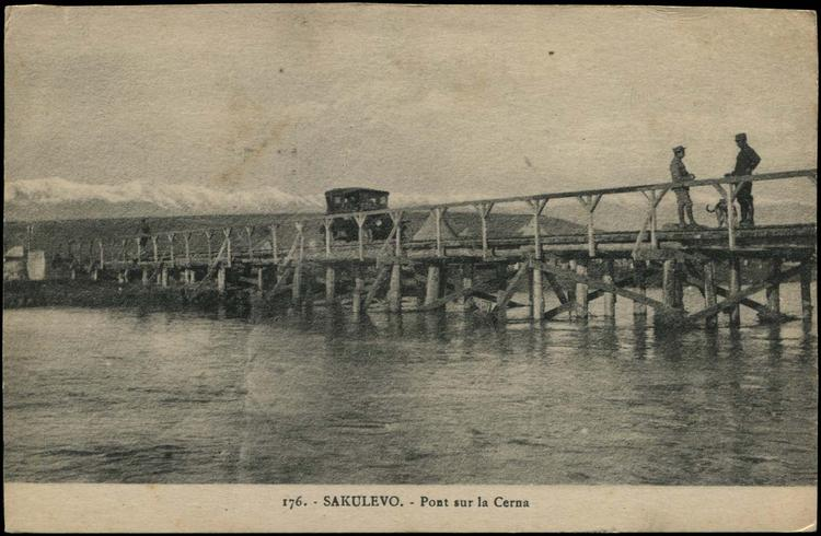 Сакулина при Сакулево.